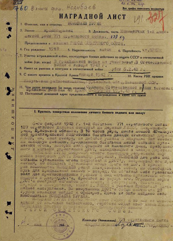 Наградной лист Нсанбаева Борана